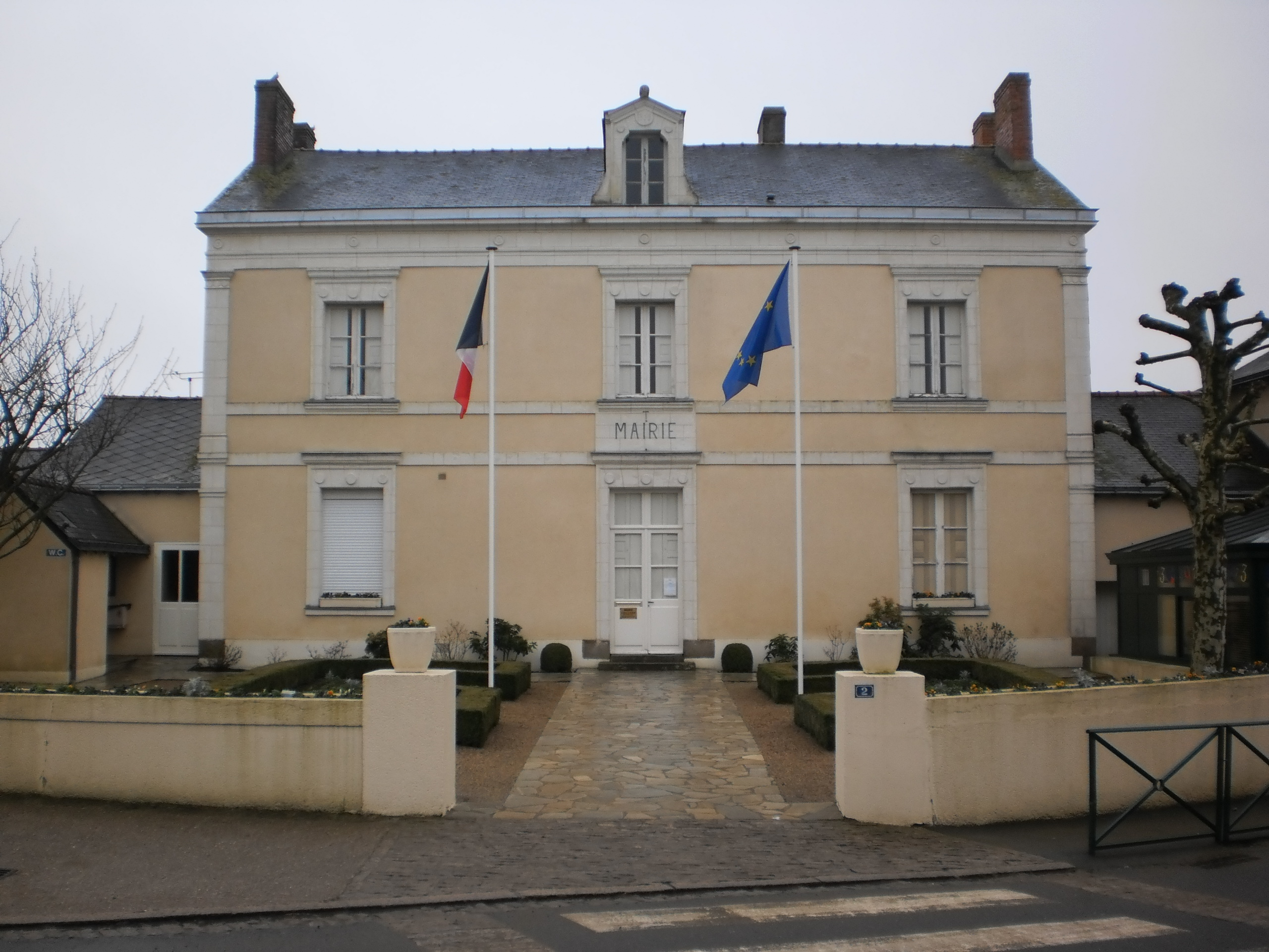 La Chapelle-Saint-Sauveur (Loire-Atlantique, France) - mairie